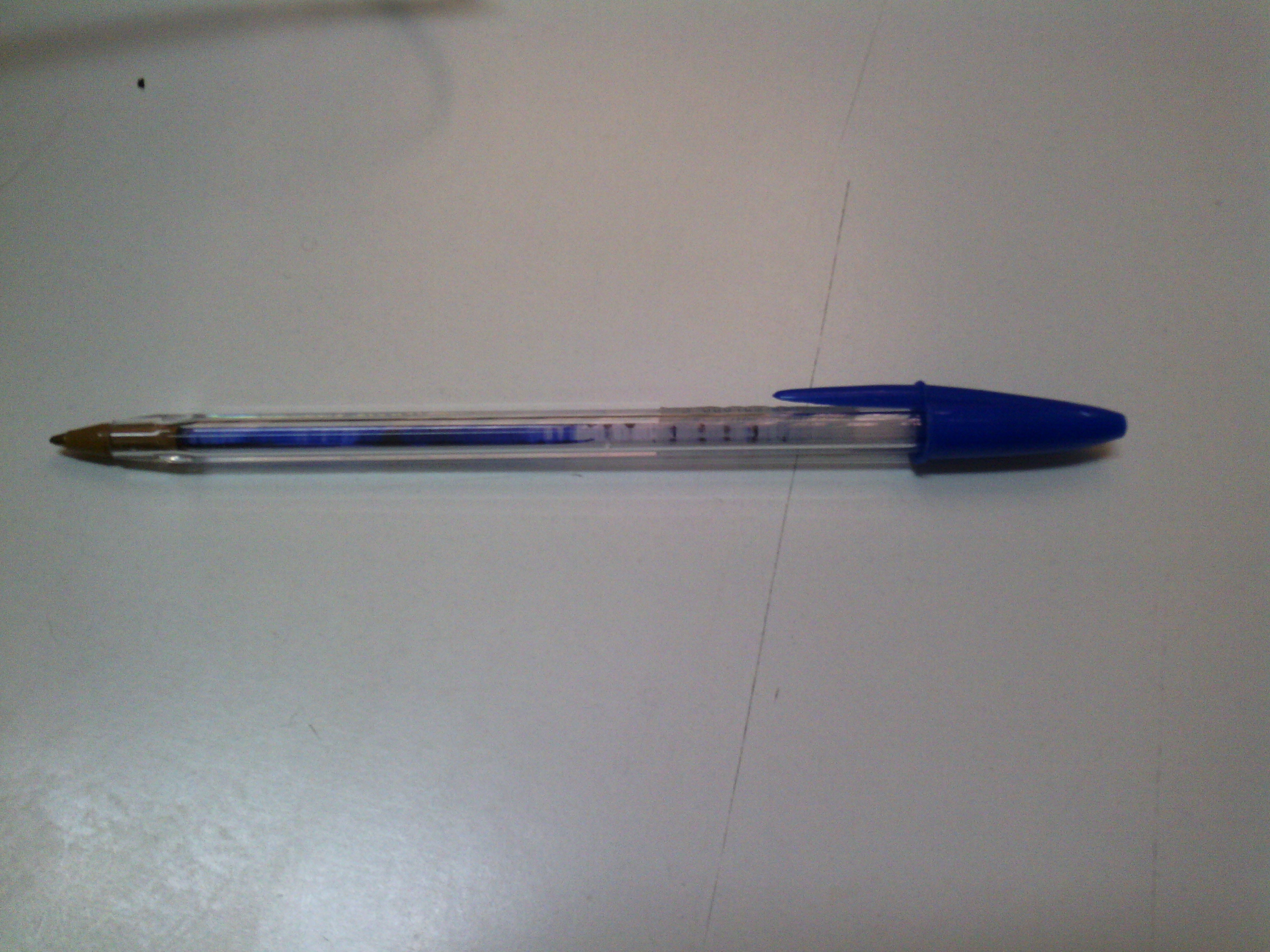 στυλό διαρκείας με μπλε μελάνι, μάρκας BIC